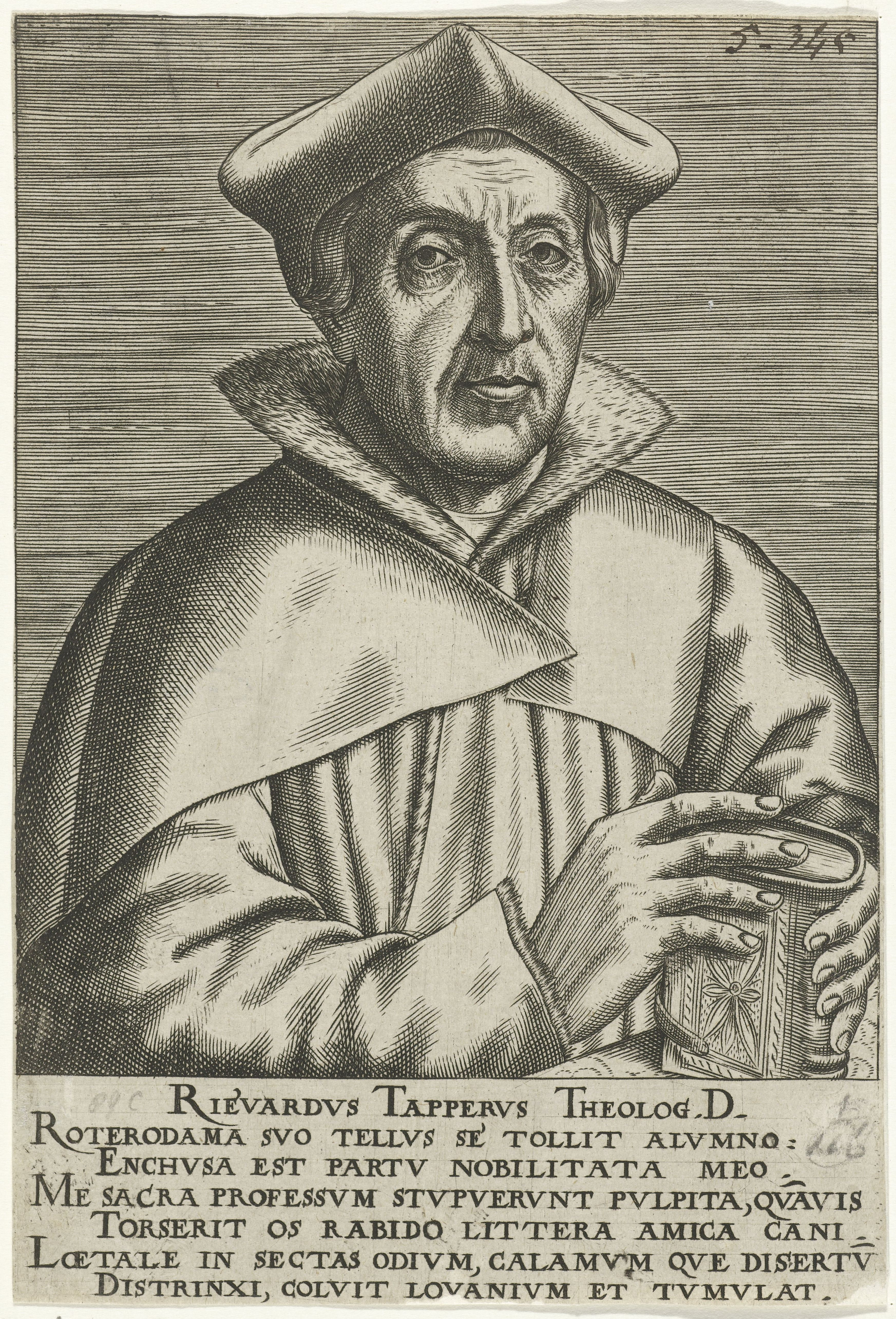 IdentificatieTitel(s): Portret van Ruard TapperRvardvs Tappervs Theolog.D. (titel op object)Portretten van beroemde Europese geleerden (serietitel)Virorum doctorum de Disciplinis benemerentium effigies (serietitel)Objecttype: prent Objectnummer: RP-P-1906-2448Catalogusreferentie: New Hollstein Dutch 678-1(4)Opschriften / Merken: verzamelaarsmerk, verso midden onder, gestempeld: Lugt 2228nummer, recto rechts boven, geschreven: ‘5.345’Omschrijving: Portret van Ruard Tapper, theoloog en professor te Leuven. Buste naar rechts. De prent heeft een Latijns onderschirft en maakt deel uit van een serie met portretten van beroemde Europese geleerden.VervaardigingVervaardiger: prentmaker: Philips Galleschrijver: anoniemuitgever: Philips GallePlaats vervaardiging: AntwerpenDatering: 1567Fysieke kenmerken: gravure en boekdrukMateriaal: papier Techniek: graveren (drukprocedé) / boekdrukAfmetingen: blad: b 116 mm × h 172 mmOnderwerpWie: Ruard TapperVerwerving en rechtenVerwerving: aankoop 1906Copyright: Publiek domein